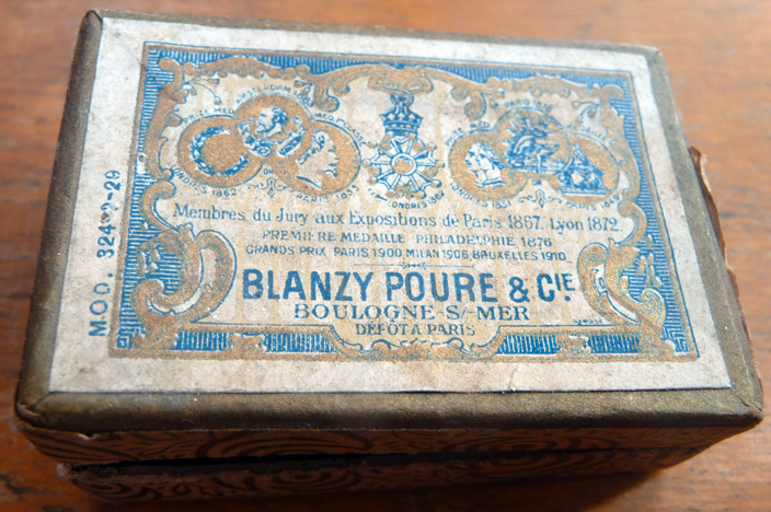 boite contenant des plumes de la société Blanzy Poure & Cie